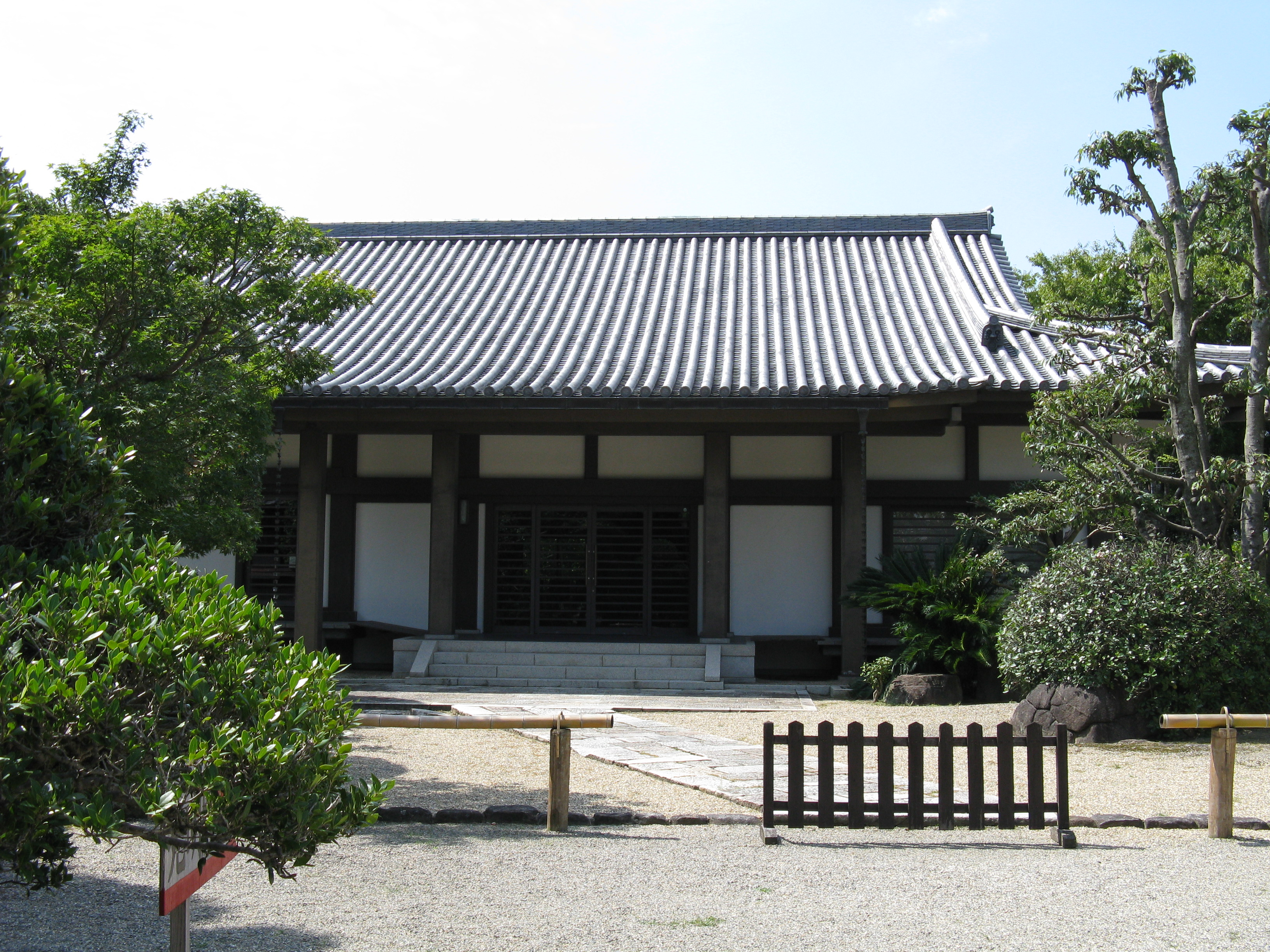 西大寺 光明殿